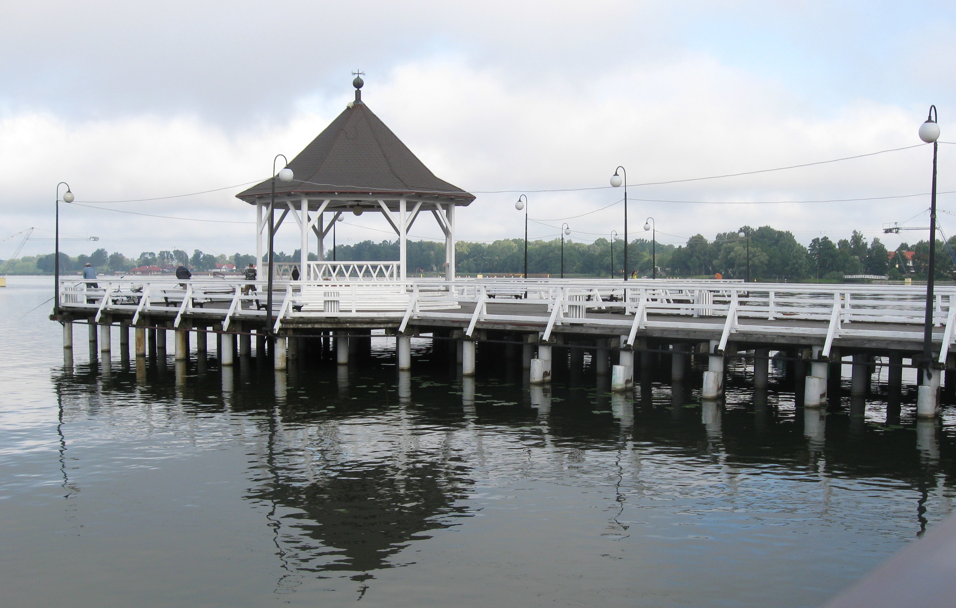 Molo przy przystani nad jeziorem Drwęckim